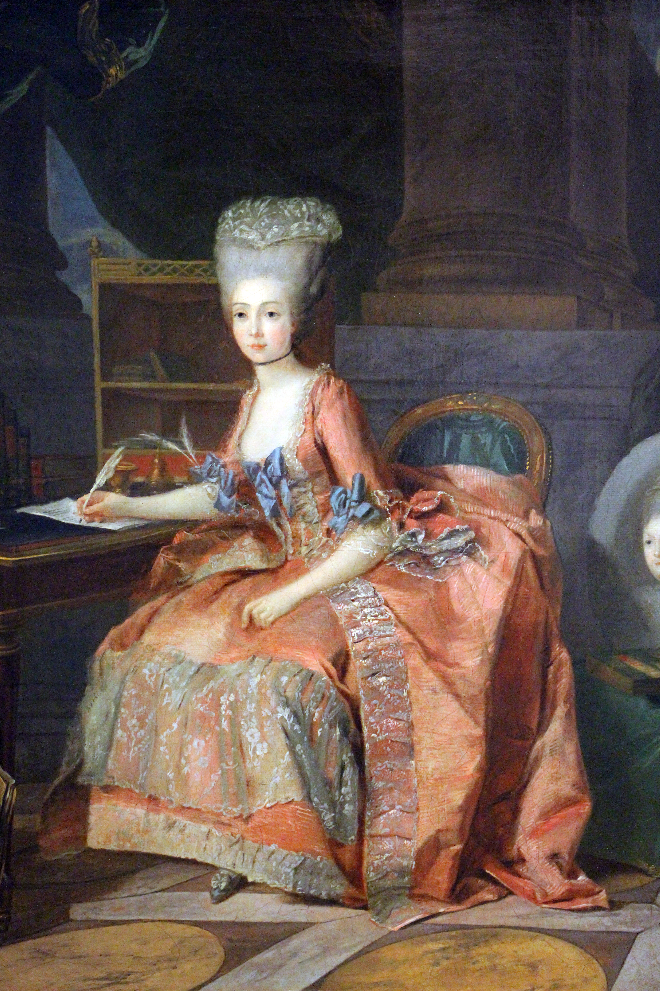 Maria Teresa di Savoia